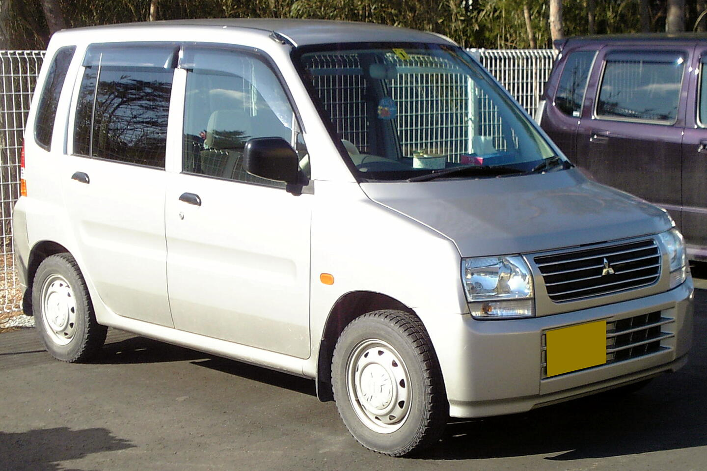 三菱・トッポBJ（中期型）